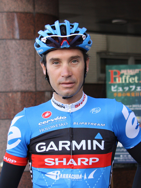 Utsunomiya 19/Oct/2012